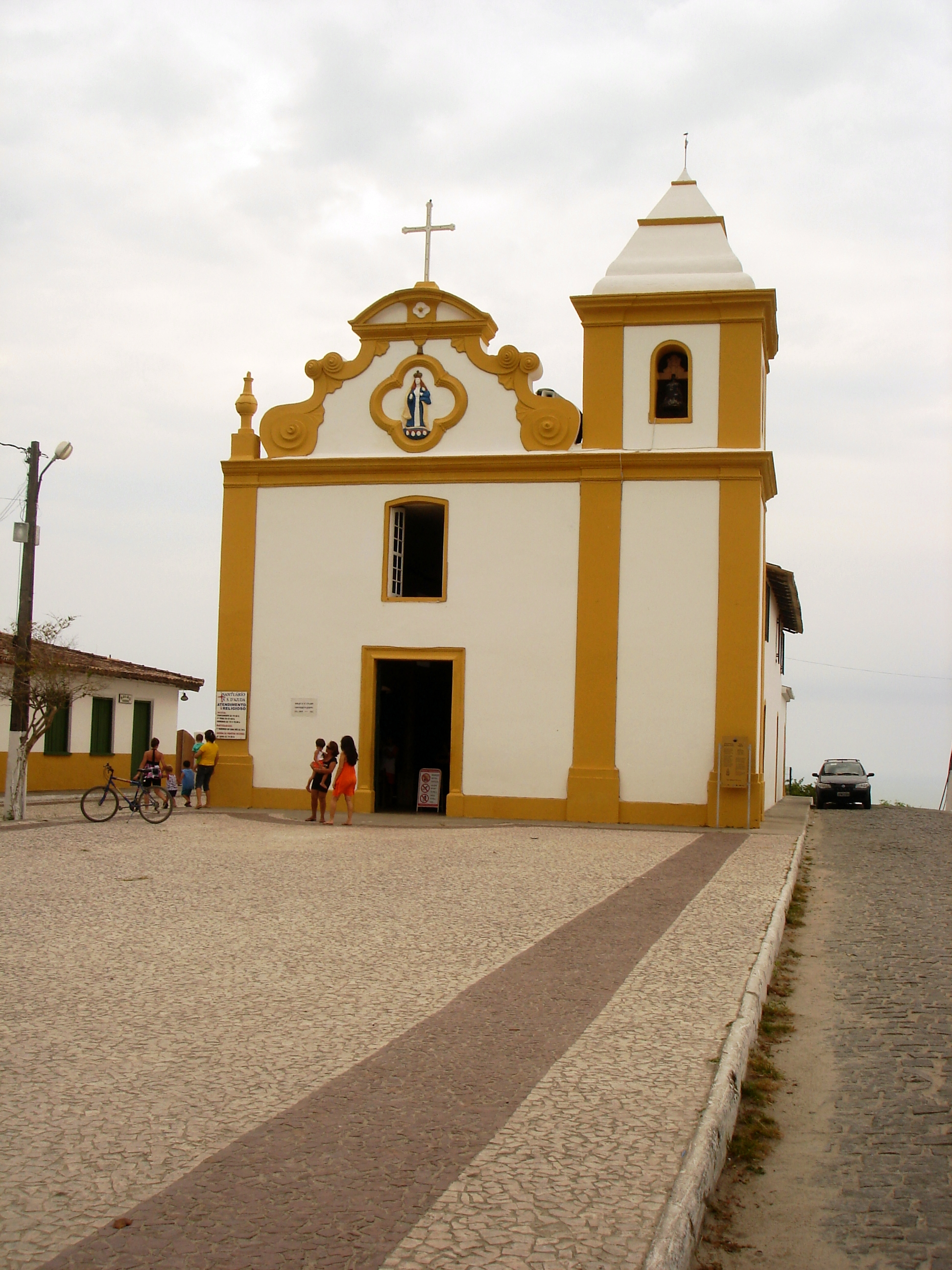 Igreja de Nossa Senhora d'Ajuda em Arraial d'Ajuda, Bahia.